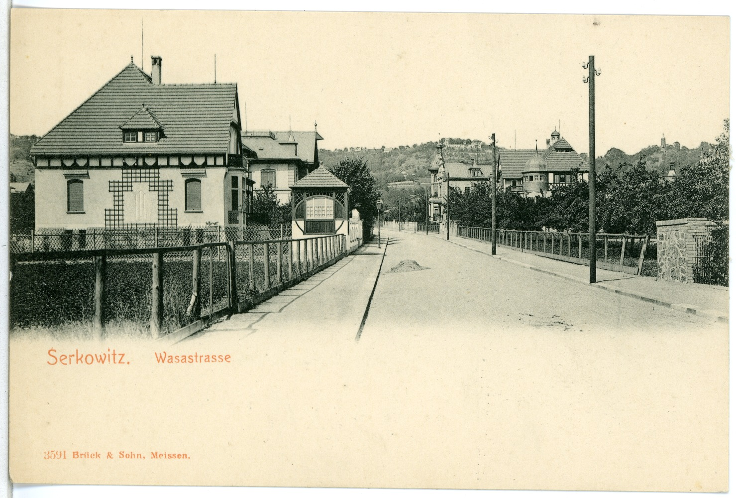 Serkowitz; Wasastraße This postcard is from publisher Brück & Sohn in Meißen ( postcard has a unique number 03591 and is available in a higher resolution at the publisher. This images was uploaded in a cooperation project between Wikipedians and the publisher.